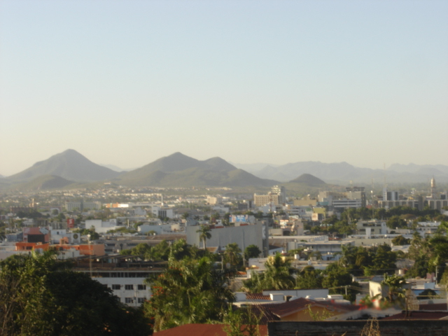 库利亚坎市.